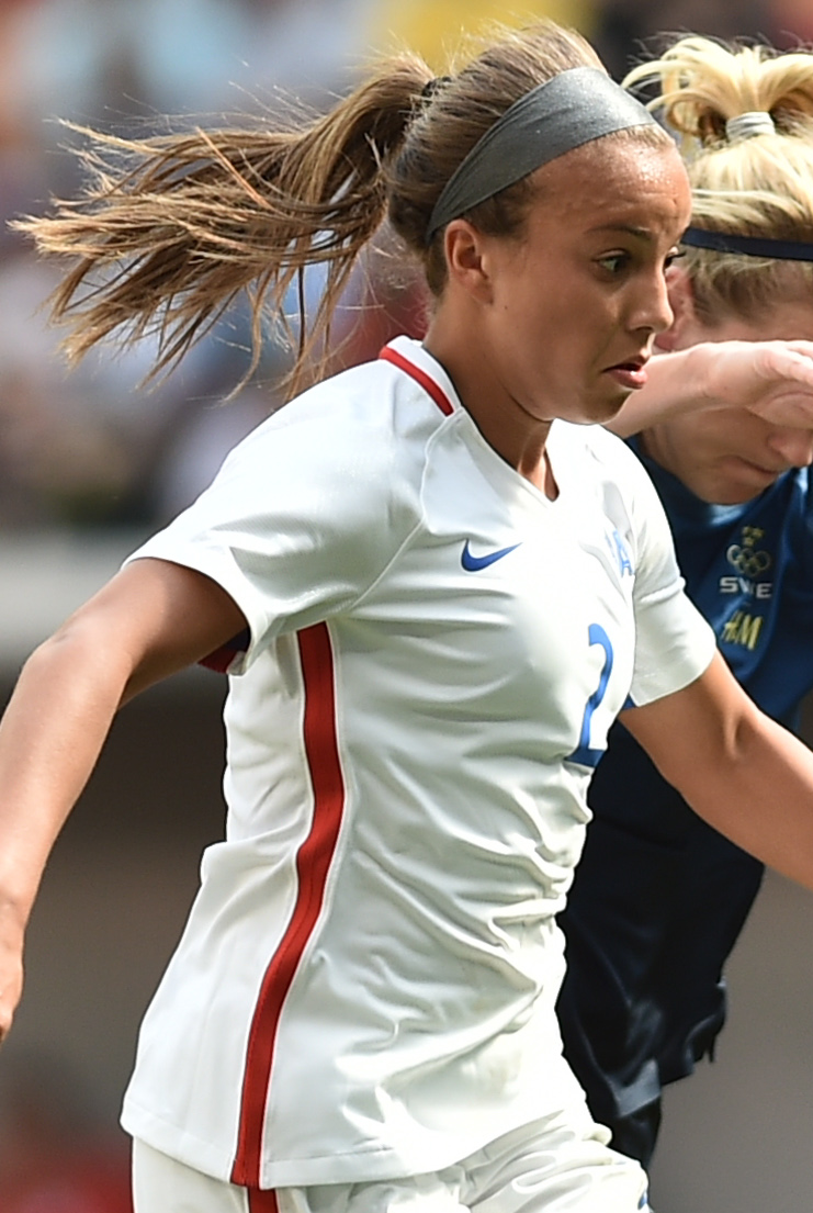 Estádio Nacional de Brasília Mané Garrincha, Brasília, DF, Brasil, 12/8/2016 Foto: Andre Borges/Agência Brasília. Estados Unidos e Suécia jogam nesta sexta-feira (12), no Estádio Mané Garrincha, pelas quartas de final do futebol feminino na Olimpíada 2016.